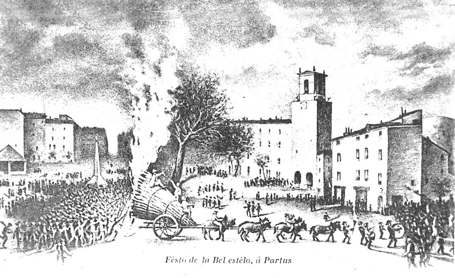 Célébration de la Sainte Estelle à Pertuis